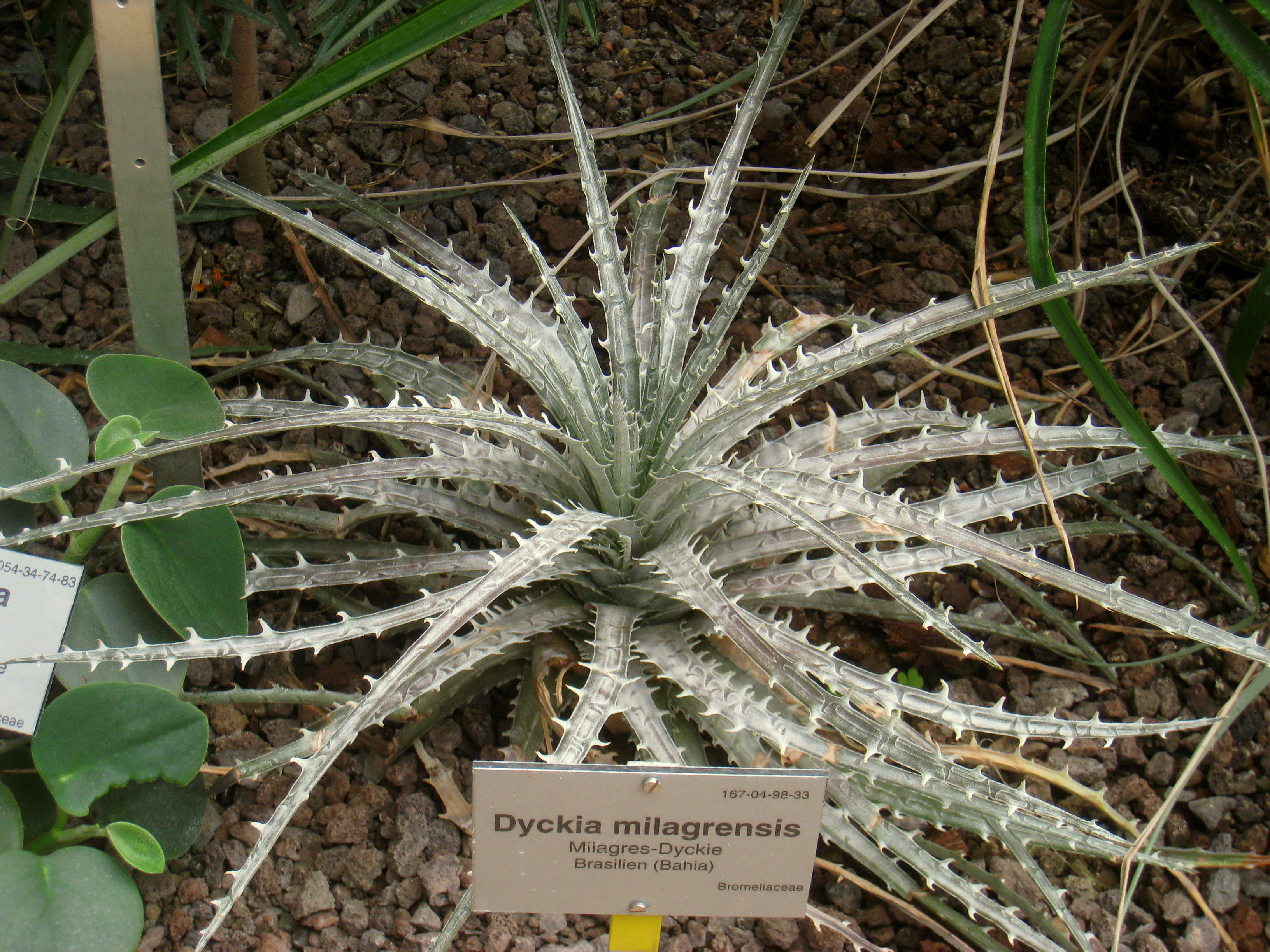 Dyckia milagrensis specimen in the Botanischer Garten, Berlin-Dahlem (Berlin Botanical Garden), Berlin, Germany.